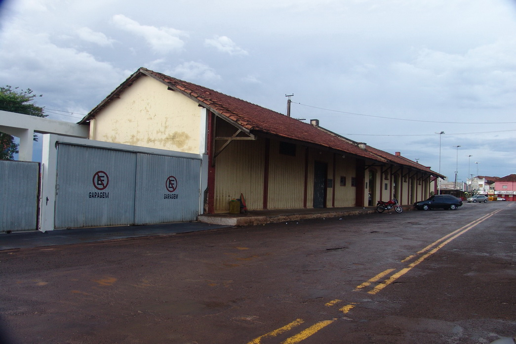 Imagem do município de Ourinhos, estado de São Paulo, Brasil.